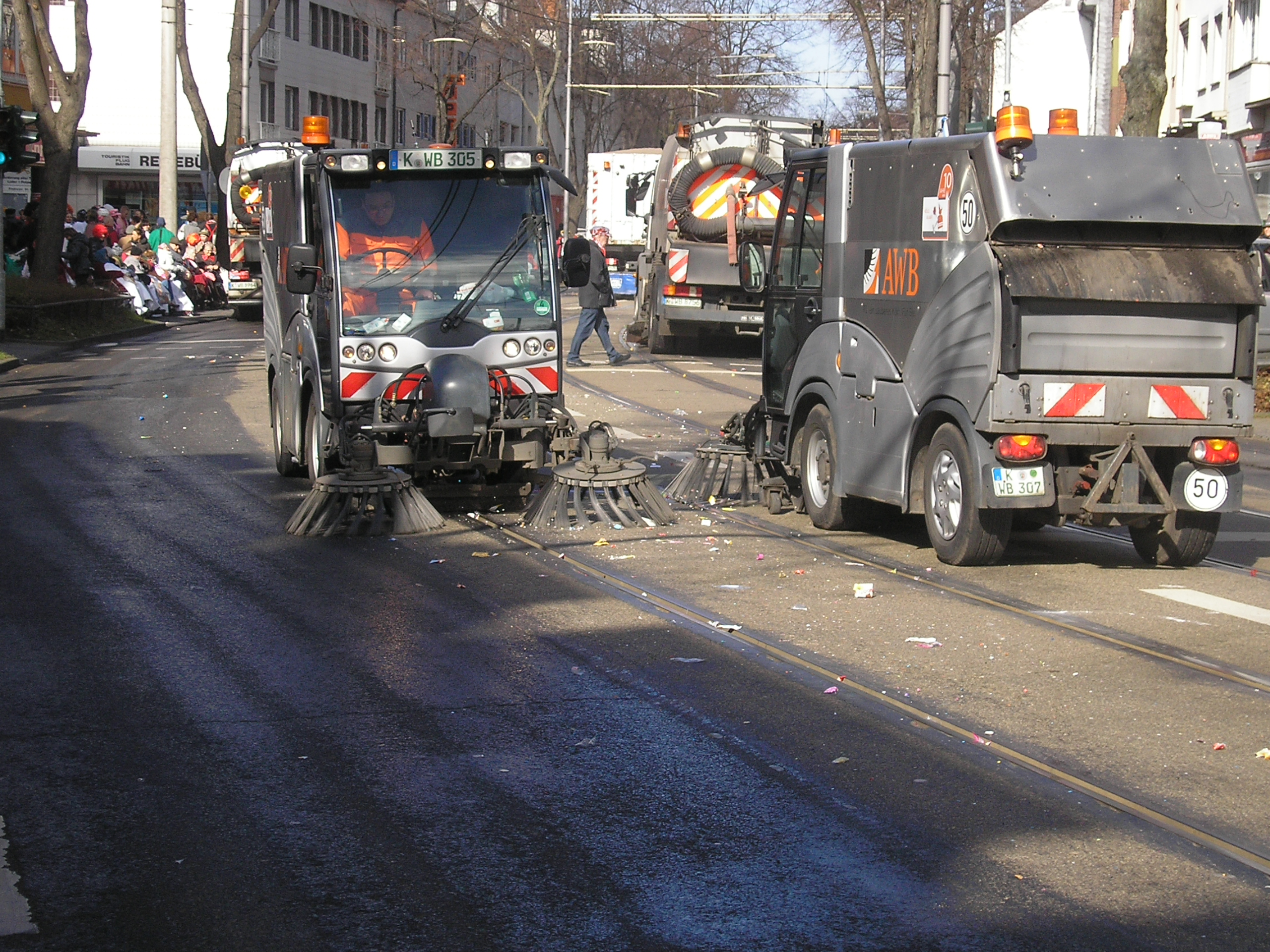 Die AWB reinigt direkt nach dem Karnevalsumzug in Köln-Poll. Karnevalssonntag 2011.